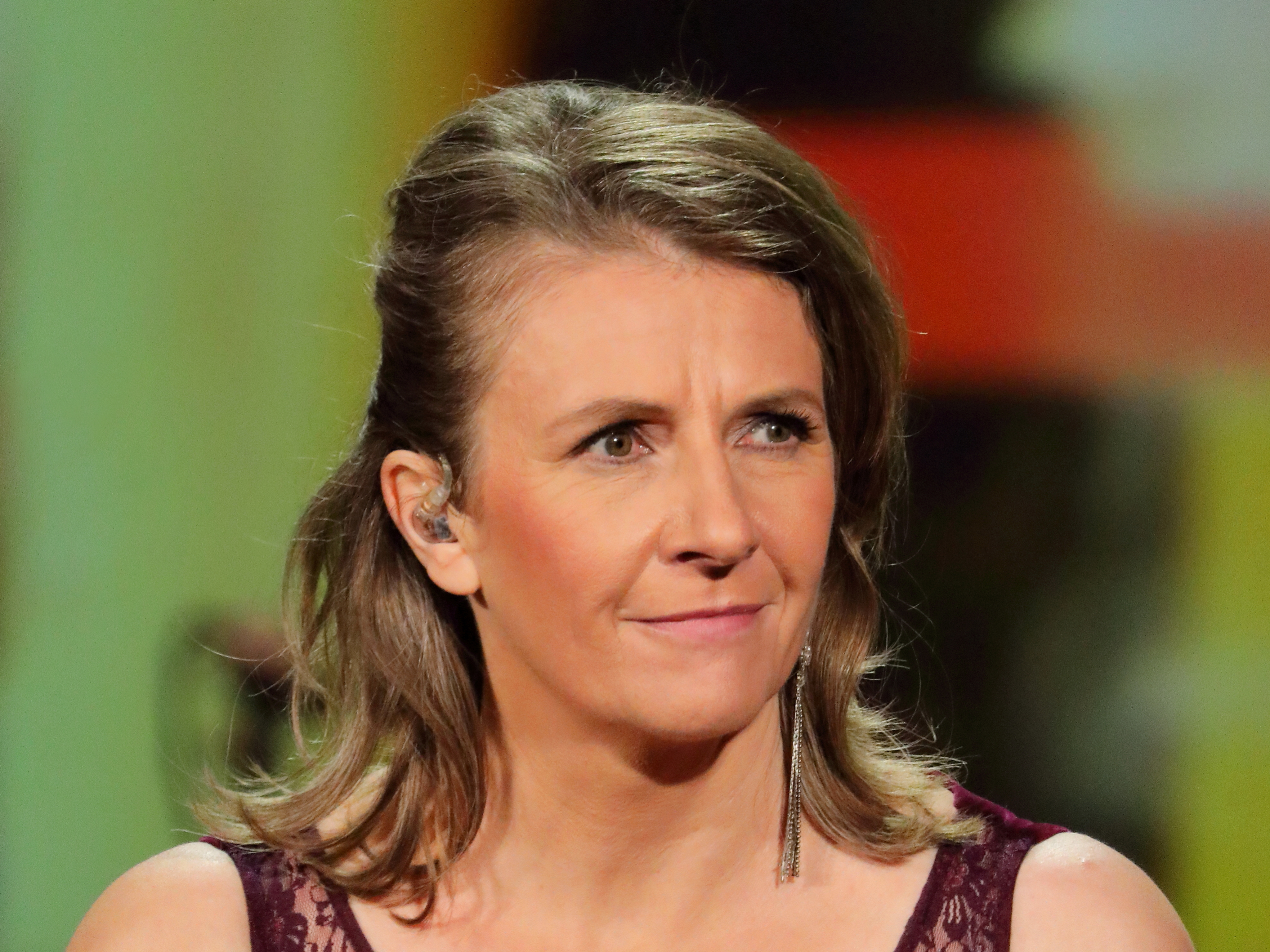 Die österreichische Sängerin Birgit Denk als Sängerin und Moderatorin bei der Eröffnung der Wiener Festwochen 2019.